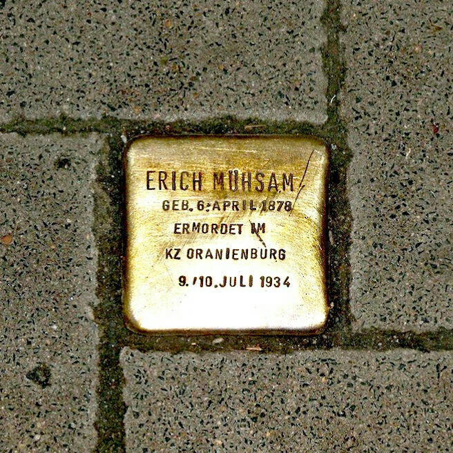 vor dem Buddenbrookhaus - im Andenken an den gebürtigen Lübecker Schriftsteller und Anarchisten Erich Mühsam, der 1933 in Oranienburg bei Berlin von den Nazis ermordet wurde. Mühsam gewidmet ist außerdem eine kleine Dokumentation im Gewölbekeller des Hauses.